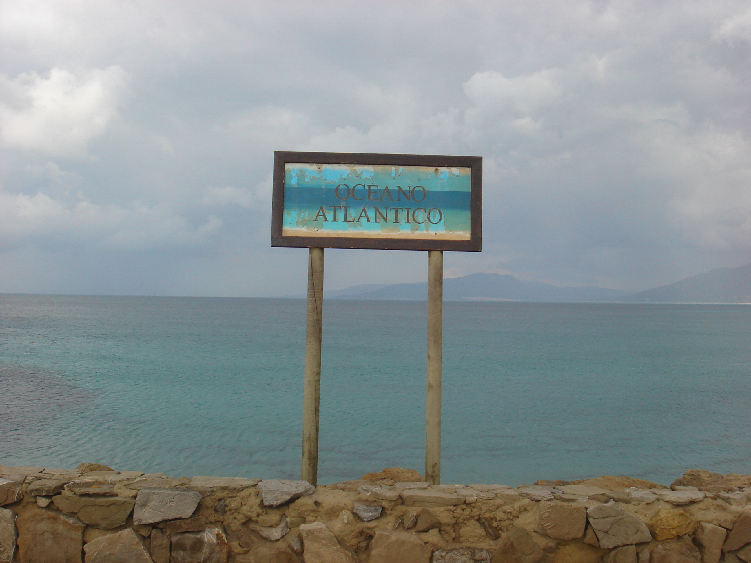 Océano Atlántico desde la Punta de Tarifa (mirando al oeste)